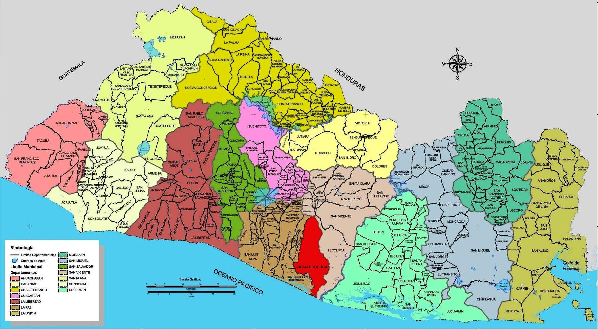 Mapa de división política de El Salvador con Zacatecoluca resaltado